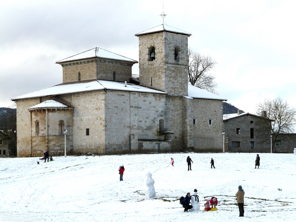 Armentiako basilika elurpean